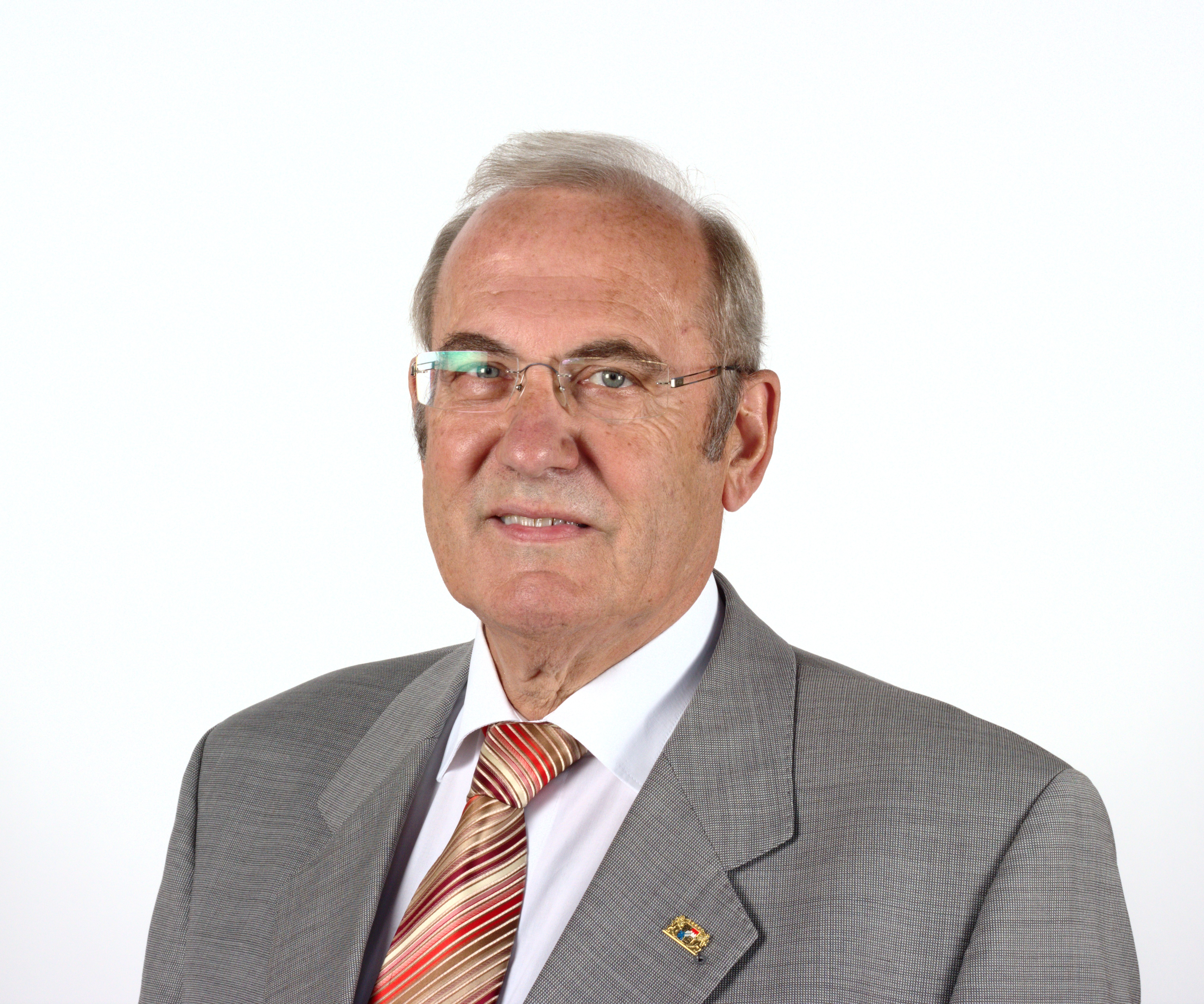 Eduard Nöth. Fotografiert im Rahmen des Landtagsprojektes Bayern 2012. Landtagsprojekt Bayern 17. bis 19. Juli 2012 in München Dieses Foto wurde im Rahmen des Projektes „Wikipedia im Landtag“ erstellt. Personality rights warning This work depicts one or more identifiable persons. The use of depictions of living or deceased persons may be restricted by laws regarding personality rights. The extent of these restrictions depends on jurisdiction. Personality rights restrictions apply independently of copyright. Before using this content, please ensure that the intended use does not infringe any personality rights under applicable laws. You are solely responsible for ensuring that you do not infringe someone else's personality rights. See our general disclaimer.